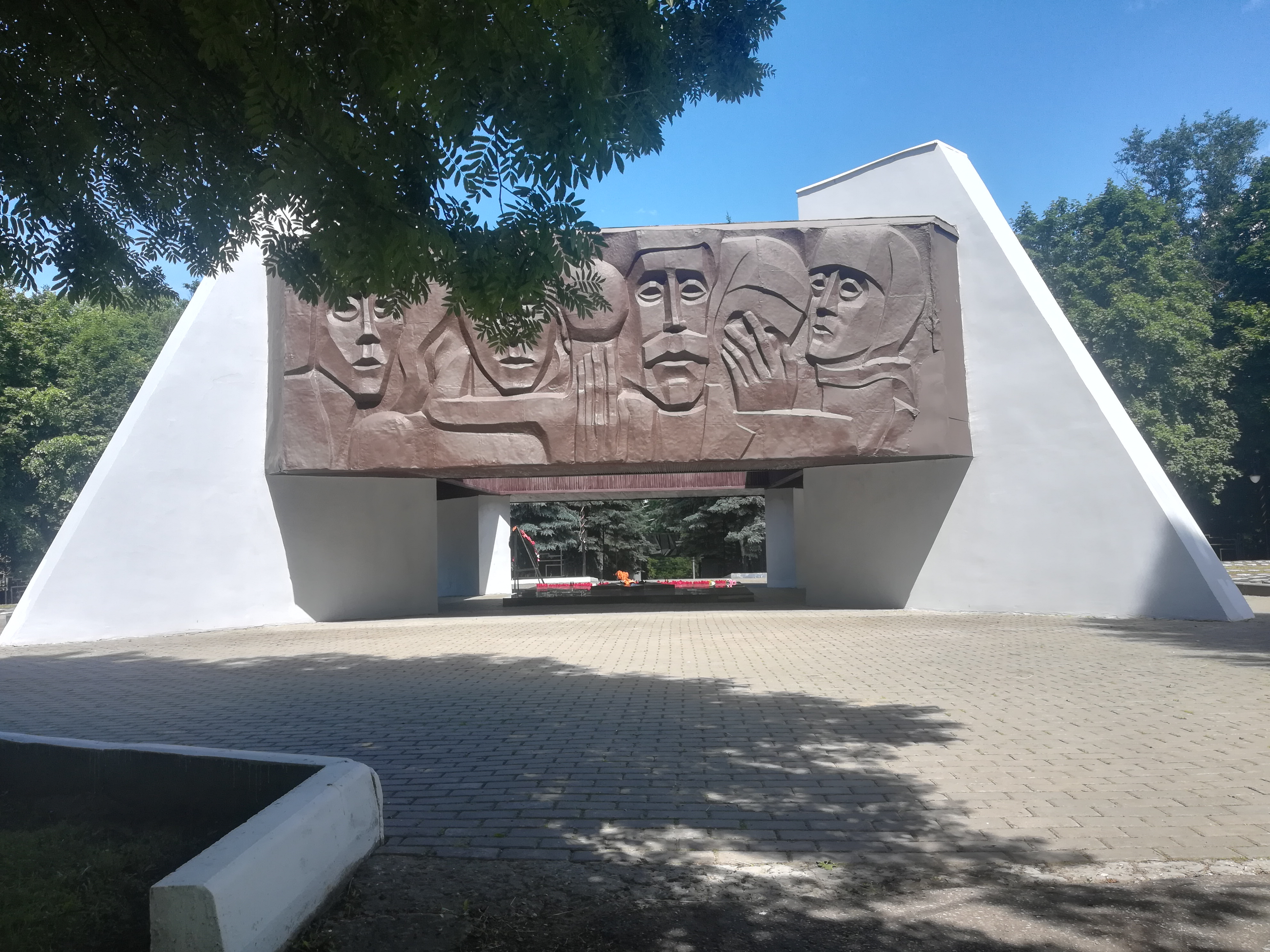 Владимир